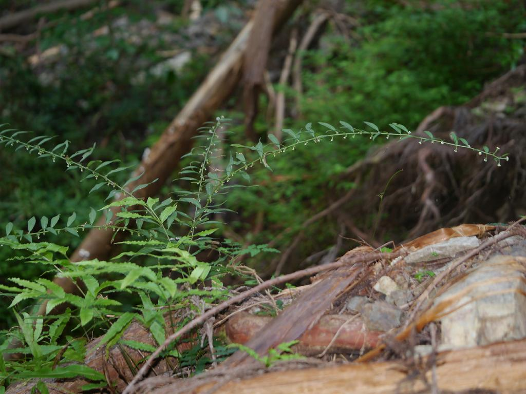 Aster vertucilatus：シュウブンソウ 2014/09/15 和歌山県田辺市：Tanabe City. Wakayama Pref. Japan